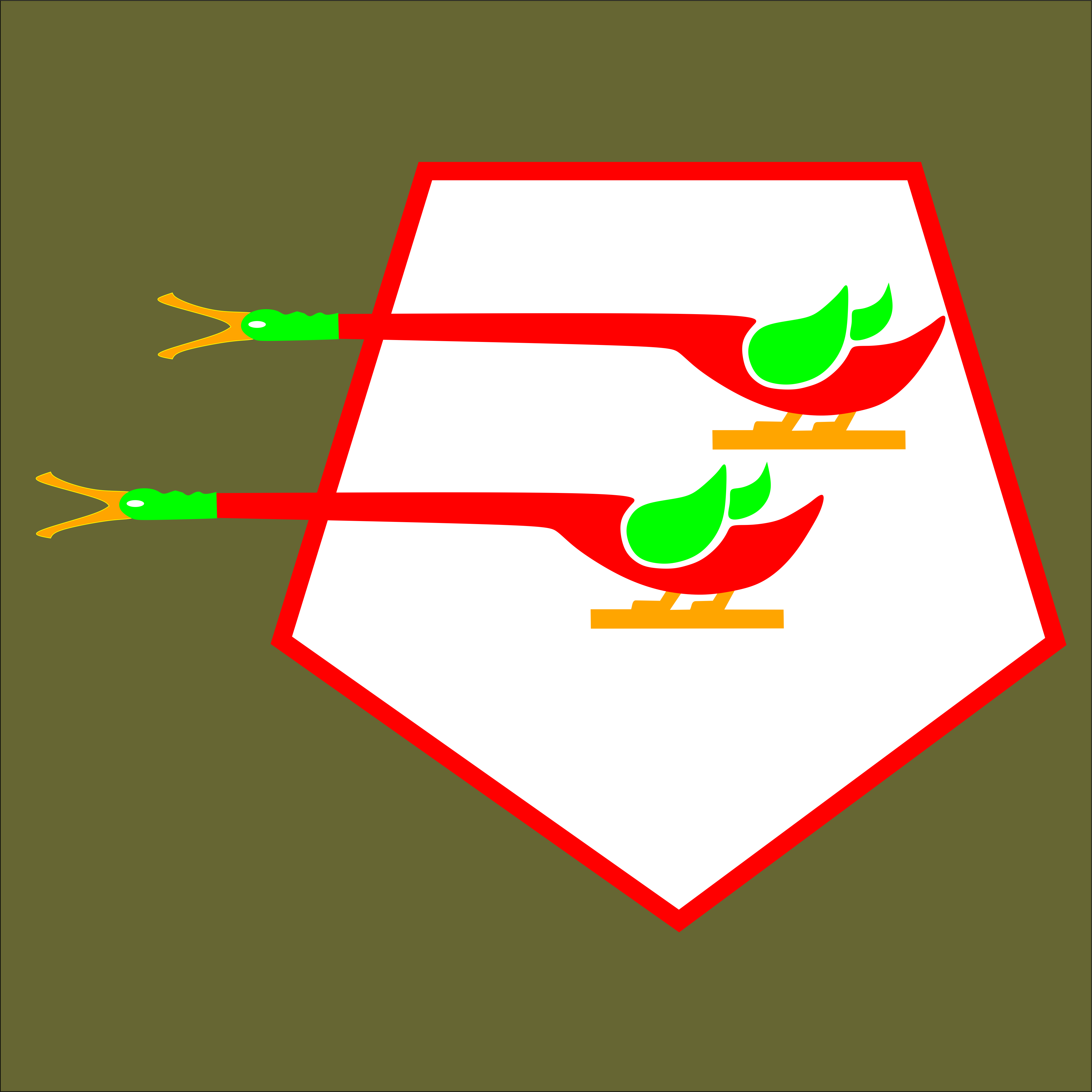 Znak malowany na samolotach 142 eskadry myśliwskiej, stosowany w latach 1927 - 1932